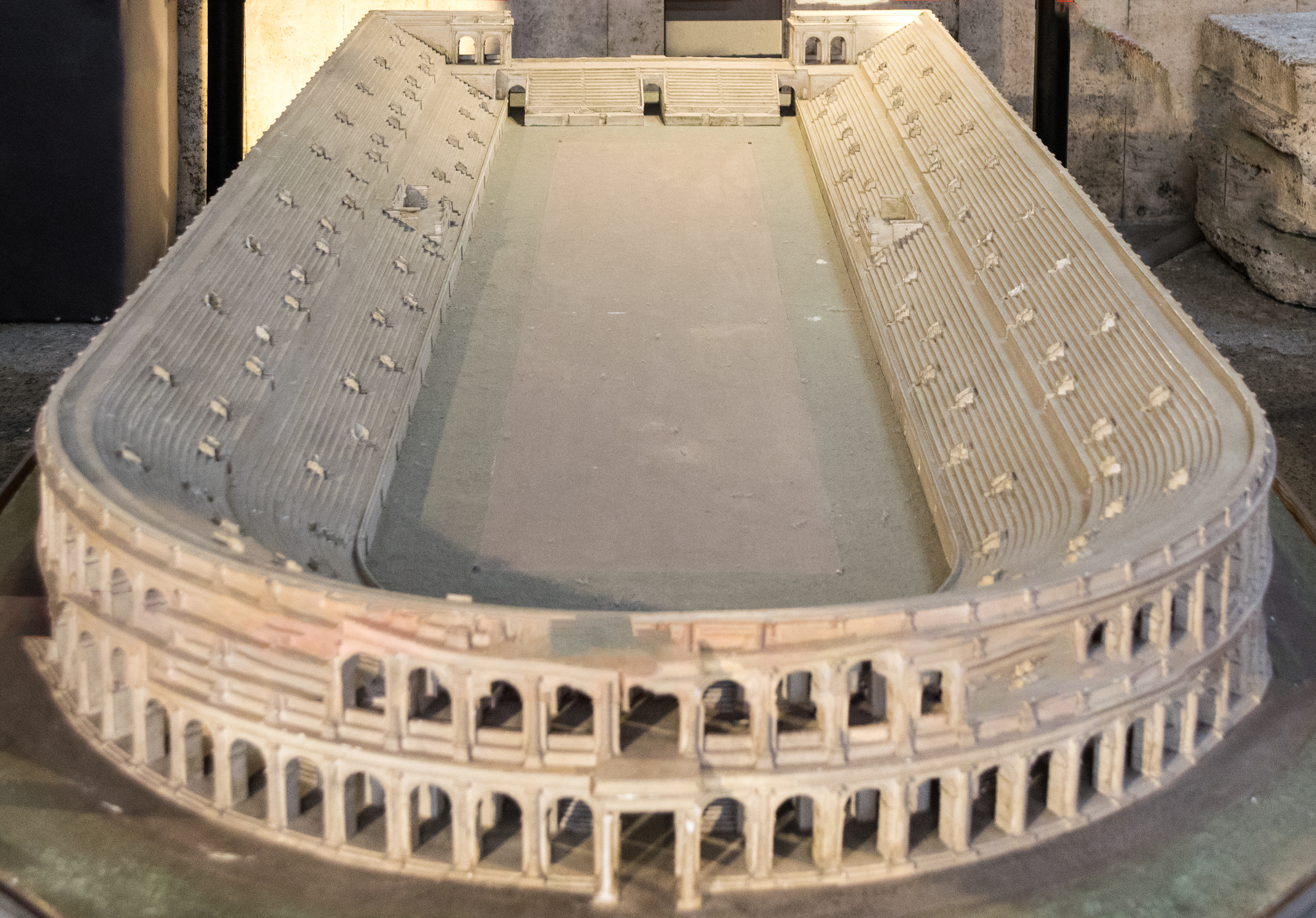 Maßstabgetreues Rekonstruktionsmodell (1:100) vom Stadion des Domitian (Nordseite) um 86 n. Chr., ausgestellt in der Via di Tor Sanguigna 3, in Rom.